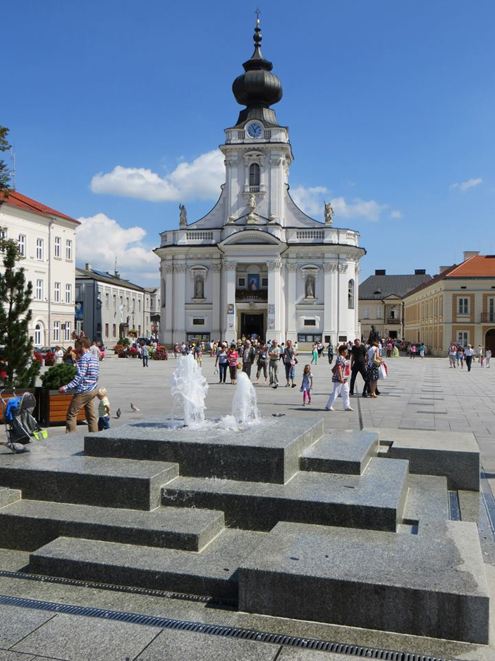 Kościół ONMP w Wadowicach wraz z odnowionym rynkiem (2013r)